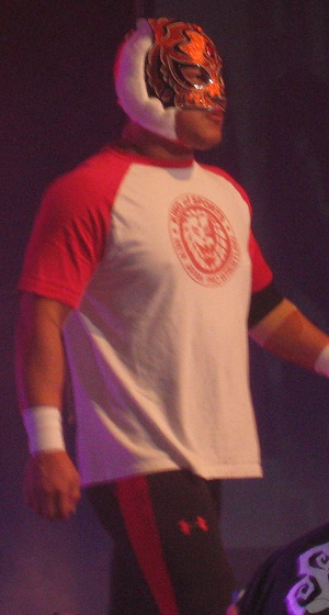 2013年9月29日 ワールド記念ホール 「DESTRUCTION」 タイガーマスク (4代目)